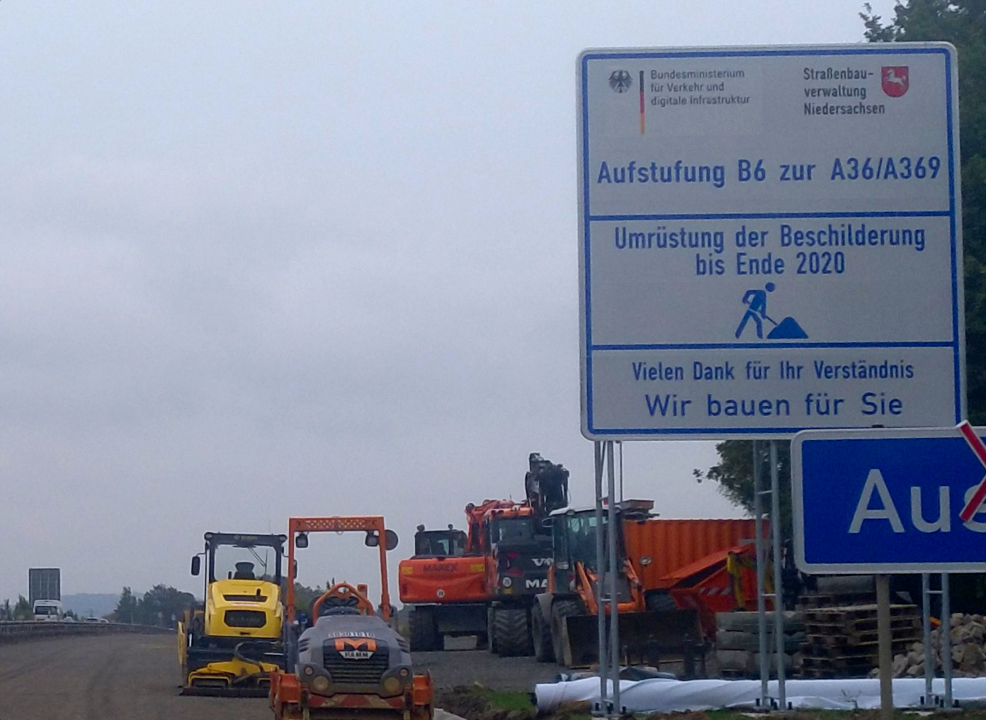 Hinweis auf Umrüstung der Beschilderung auf der A 36/369, 6. Oktober 2019.